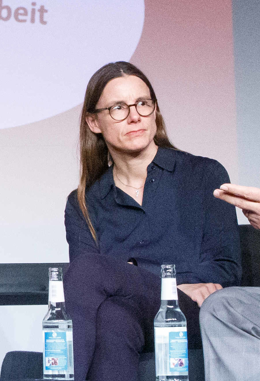 Discussion: "Bei uns heißt Siri Mary" - KI macht Arbeit Speaker: Katrin Suder, Efstathios Michailidis , Reiner Hoffmann, Anna Kopp,Thomas Ramge